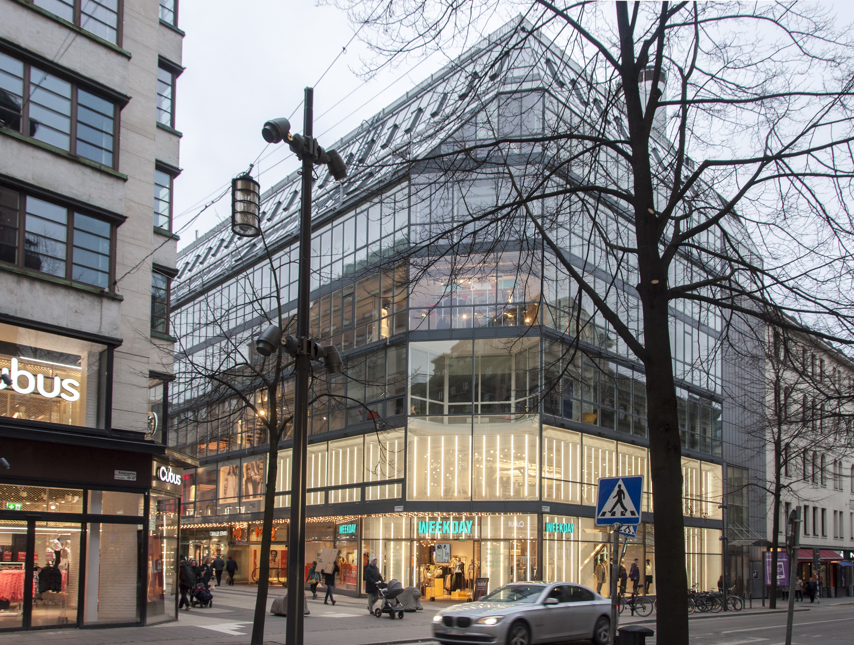 Bohagshuset, tidigare PUB. Byggnadsår 1955-59 Arkitekter Erik och Tore Ahlsén.